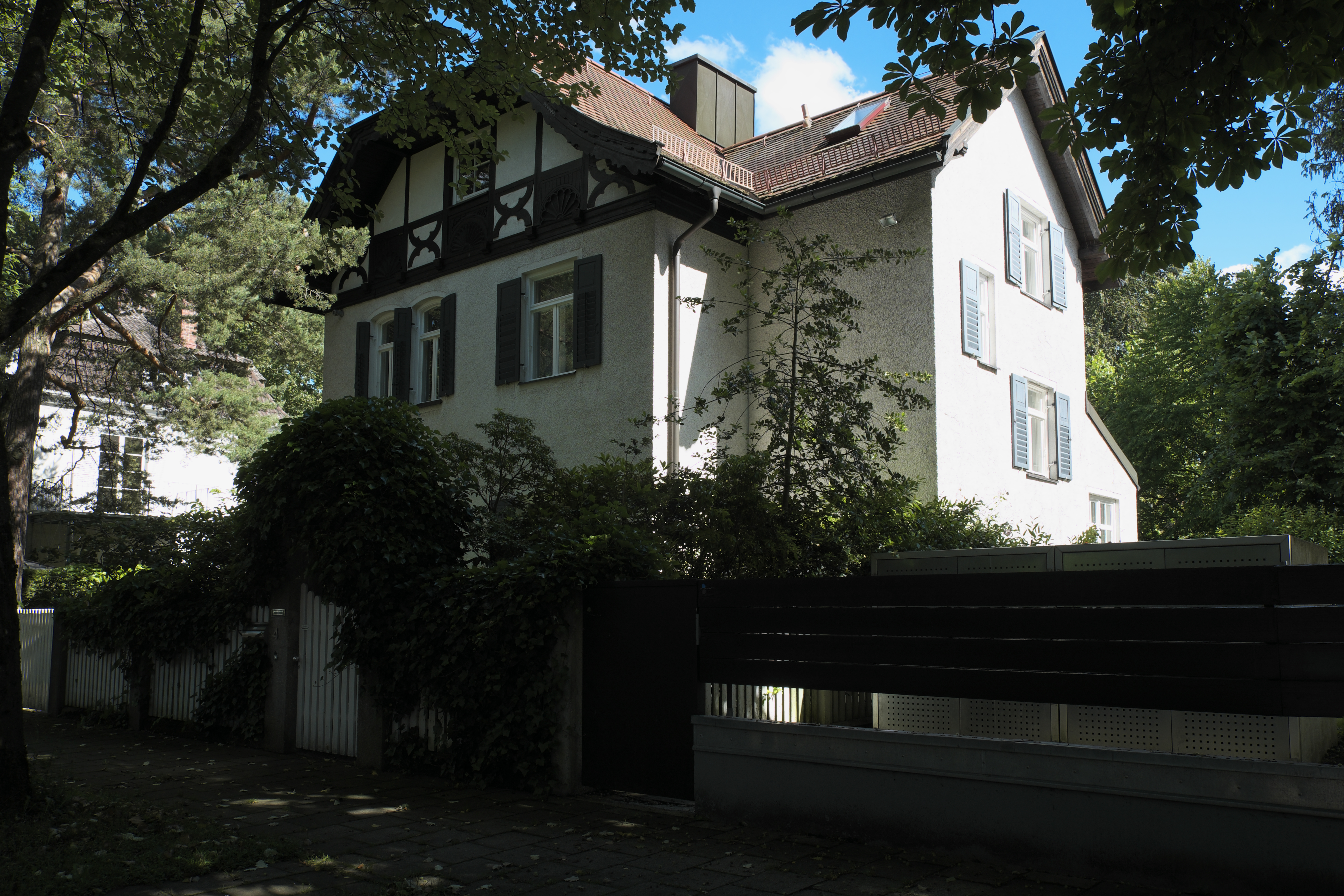 Villa in der Mark-Twain-Straße 4 in Obermenzing im Stadtbezirk Pasing-Obermenzing in München (Bayern/Deutschland)